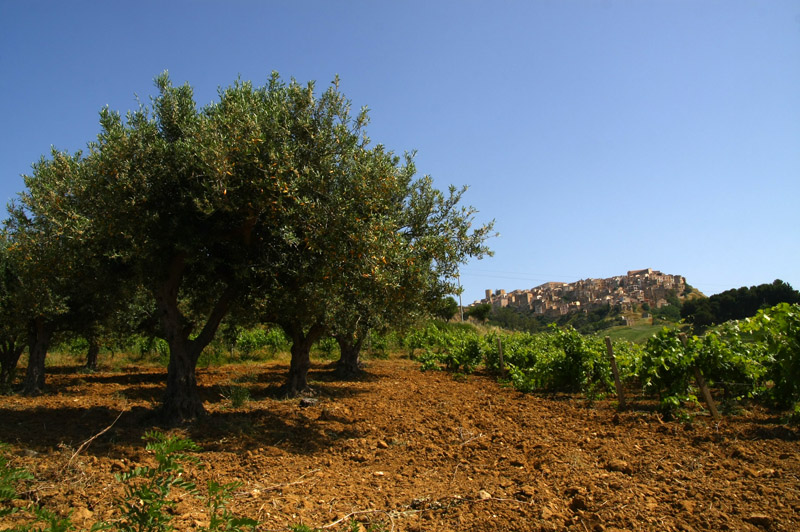 Salemi